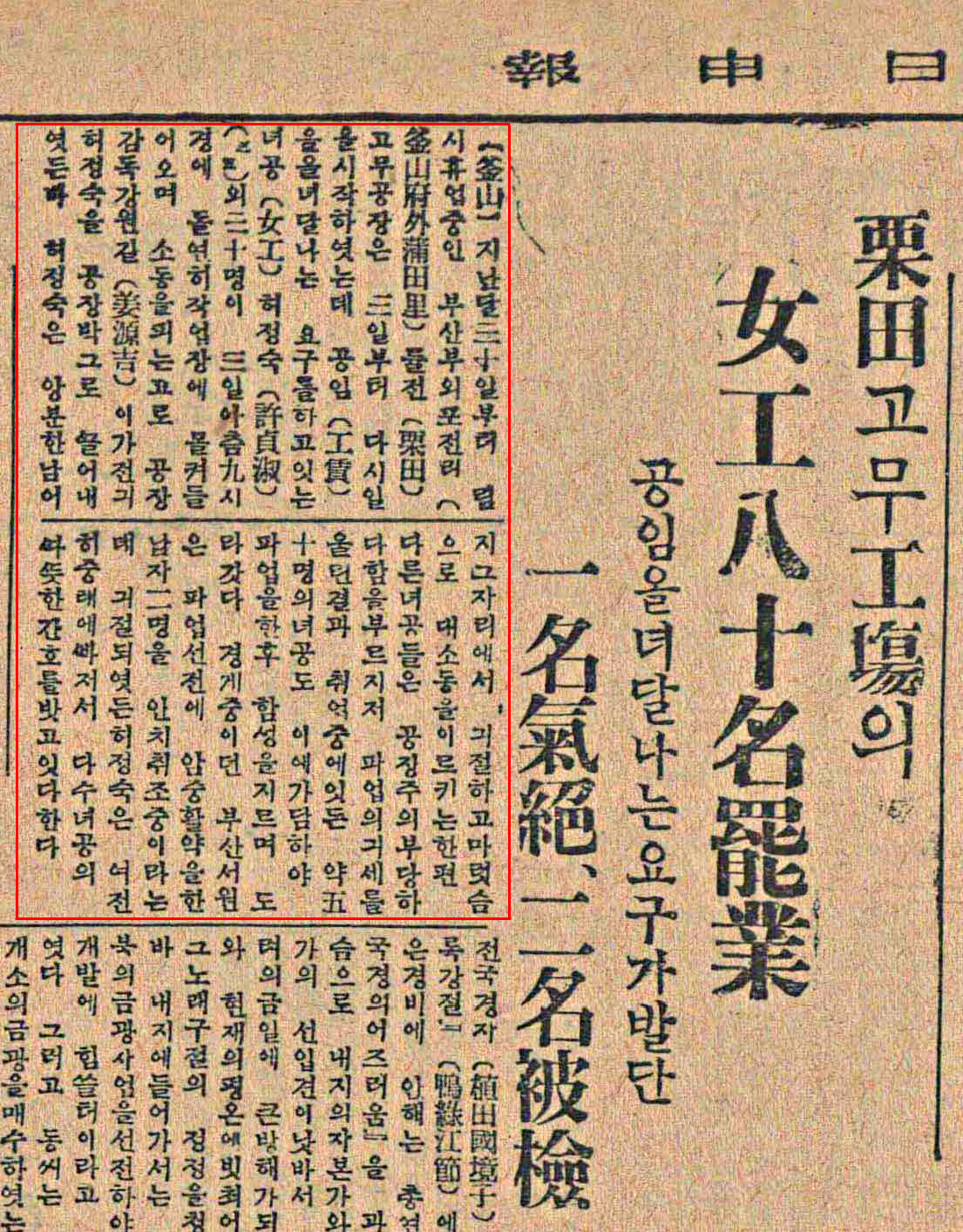 율전고무 파업 사태 관련 뉴스